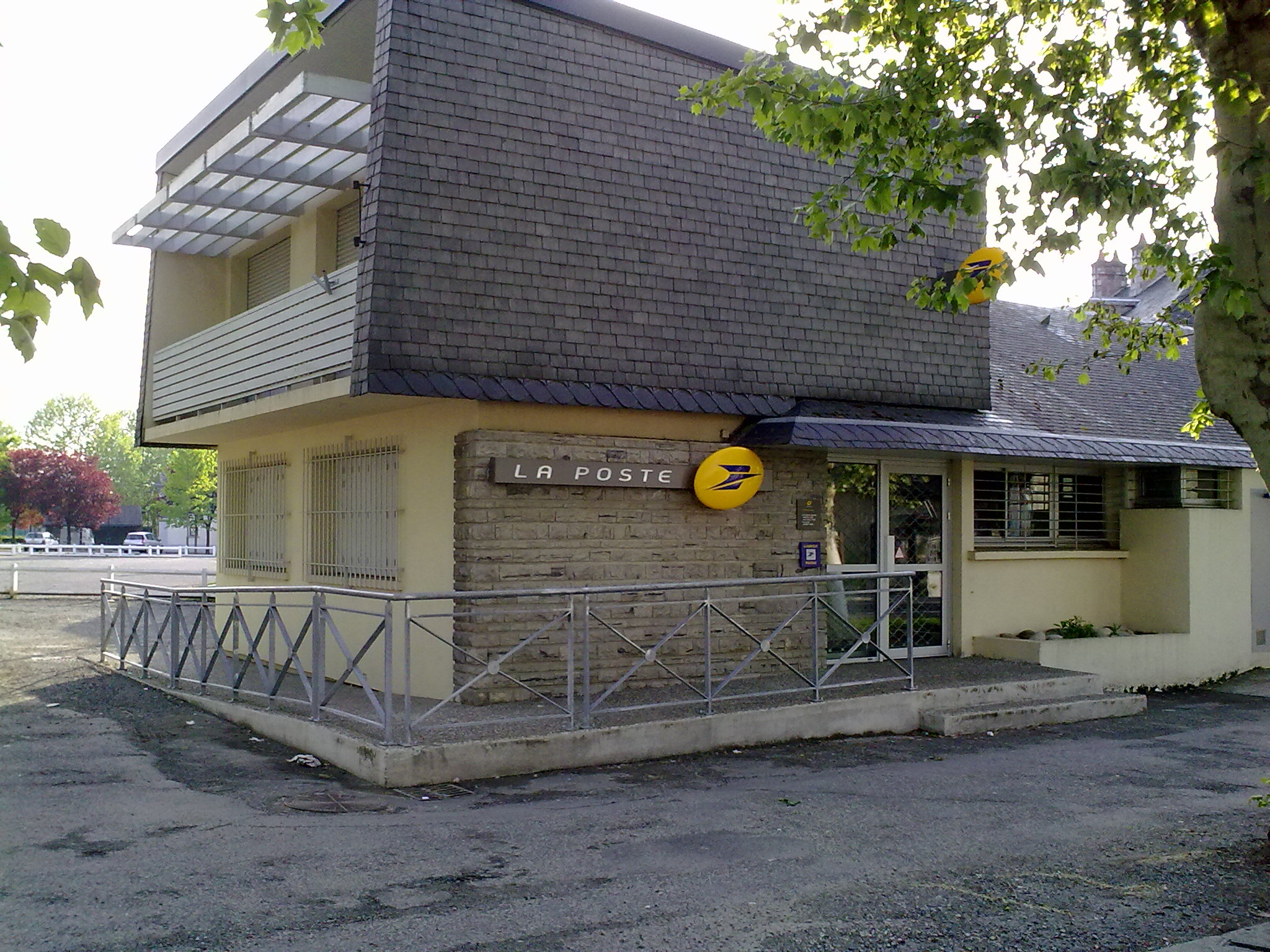 Laloubère, France